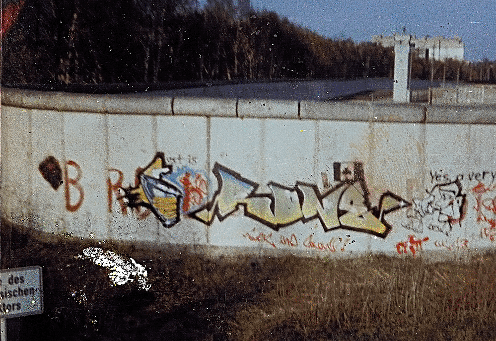 erste graffiti an der berliner mauer